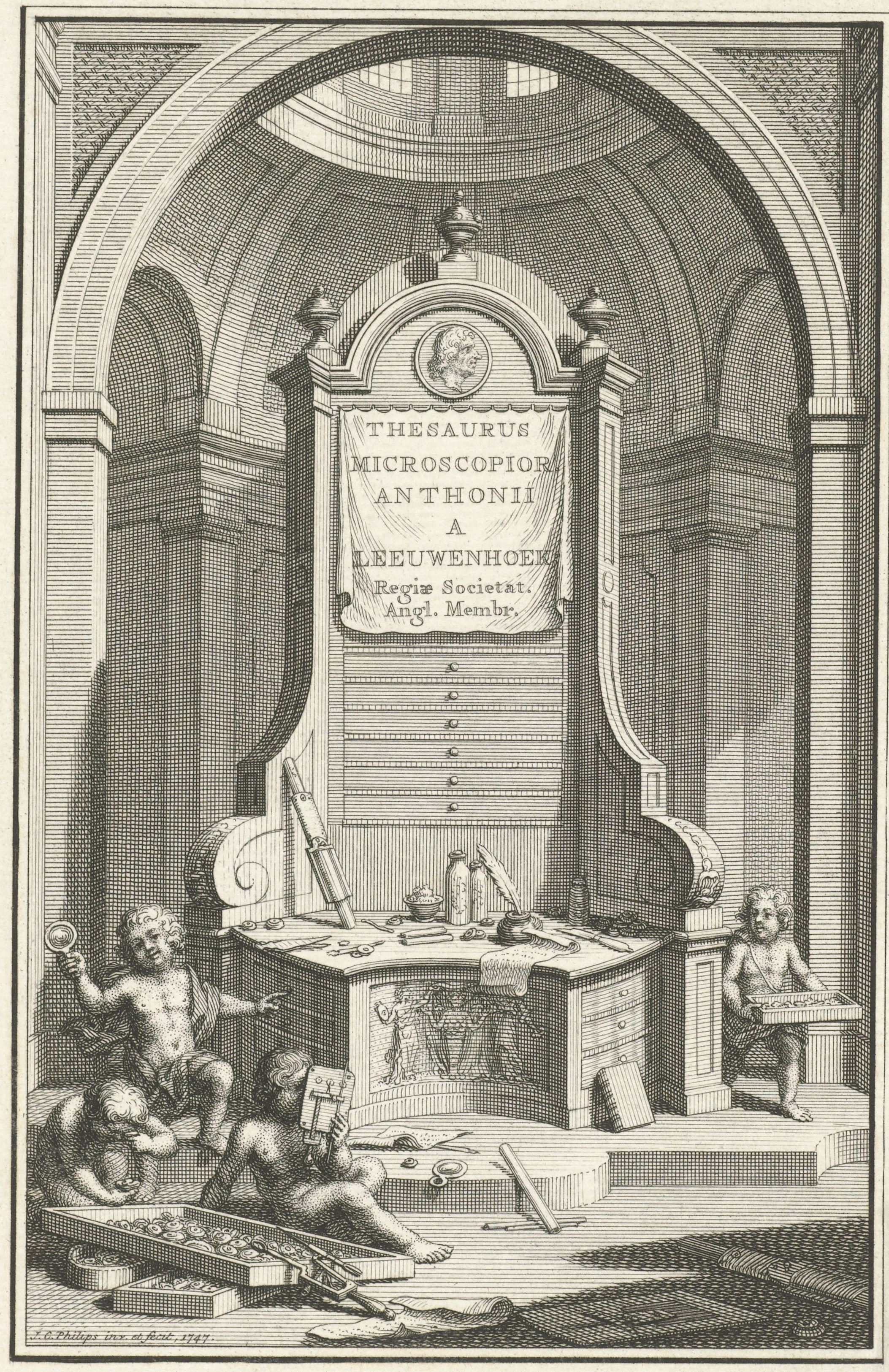 Nis met een bureau waarop in een medaillon het portret van Antoni van Leeuwenhoek en daaronder op een doek de titel in het Latijn. Op de voorgrond spelen putti met vergrootglazen.